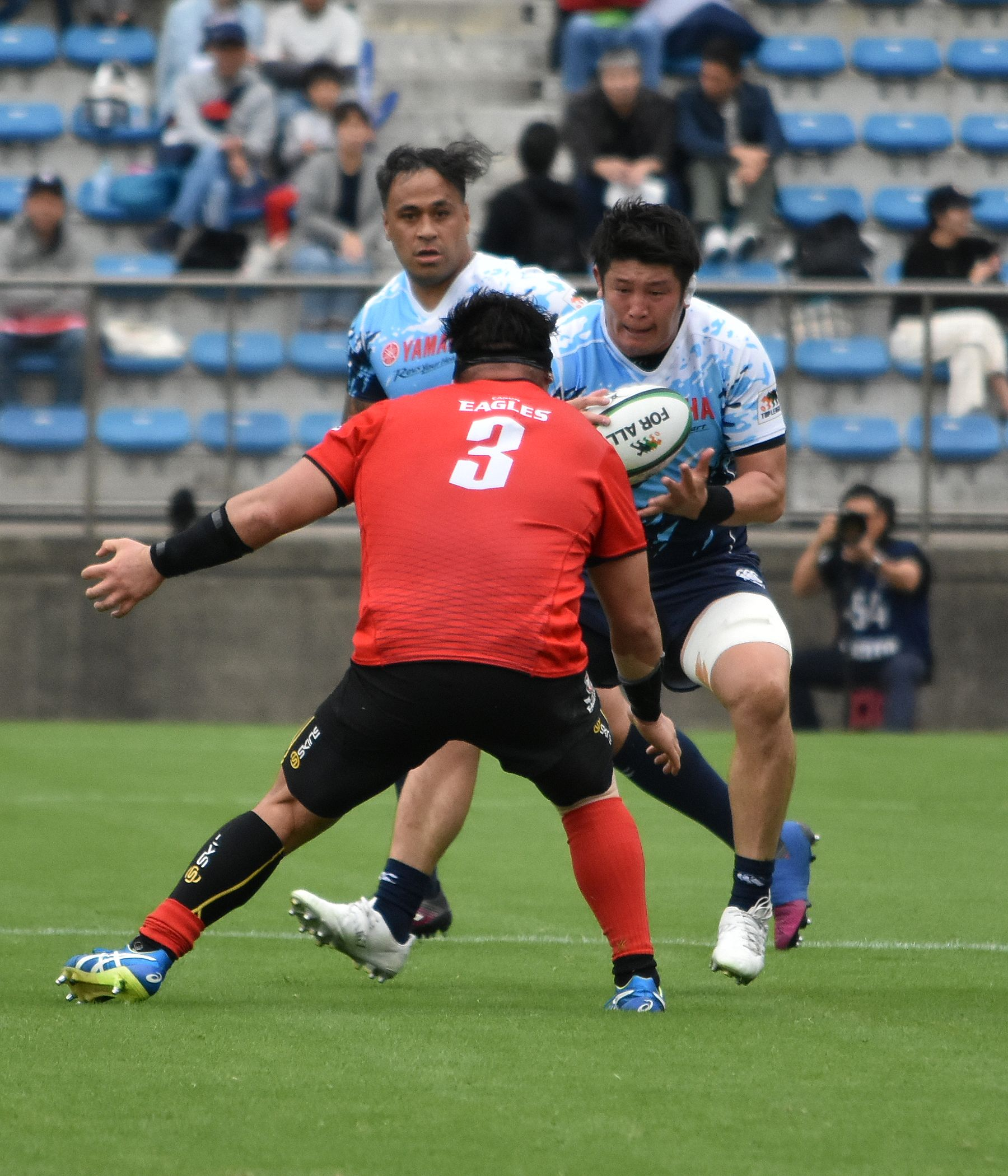 大戸 裕矢